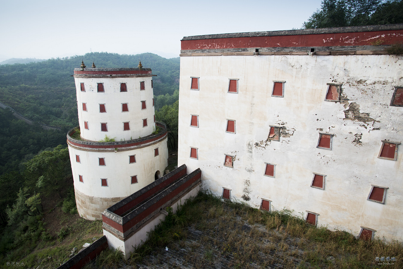 中文（中国大陆）: 西侧一栋城堡样的建筑